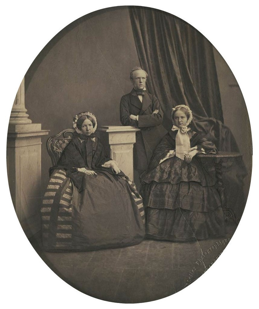 Николай Романович Ребиндер с женой Александрой Сергеевной, ур. Трубецкой (слева) и дочерью Надеждой.